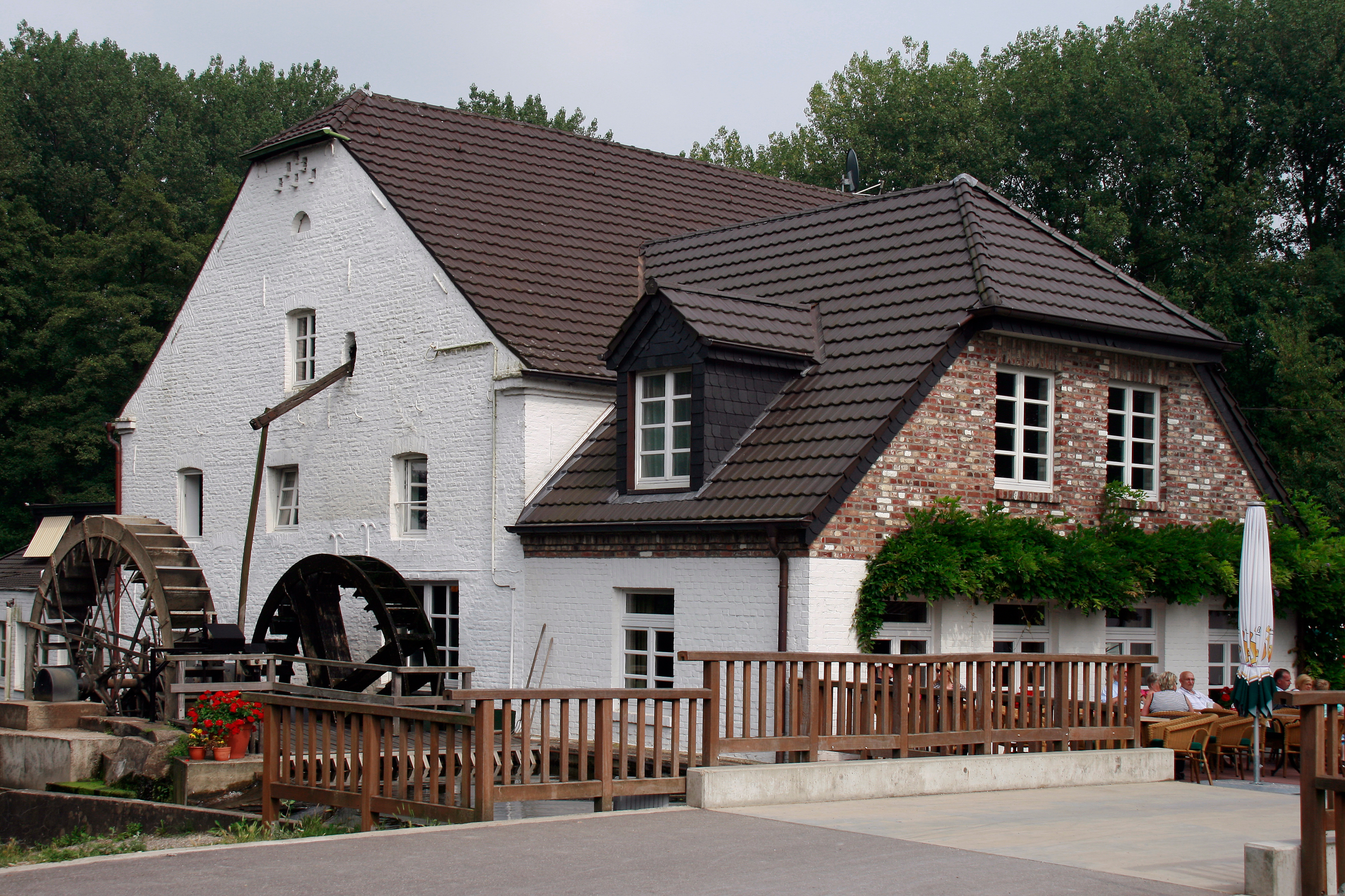 Die am nördlichen Abfluss des Hariksees gelegene Mühlrather Mühle ist die älteste Wassermühle am Niederrhein (anno 1447). Sie ist die einzige Schwalmmühle, an der sich noch zwei erhaltene Mühlräder drehen. Aus dem ihr vorgelagerten Hariksee erhält sie ihr Wasser, dem einzigen größeren Schwalmsee. Heute wird in der Mühle ein Hotelrestaurant betrieben. - Amern, Mühlrather Mühle 2 This image shows a heritage building in Germany, located in the North Rhine-Westphalian city Schwalmtal (Niederrhein) (no. 106).